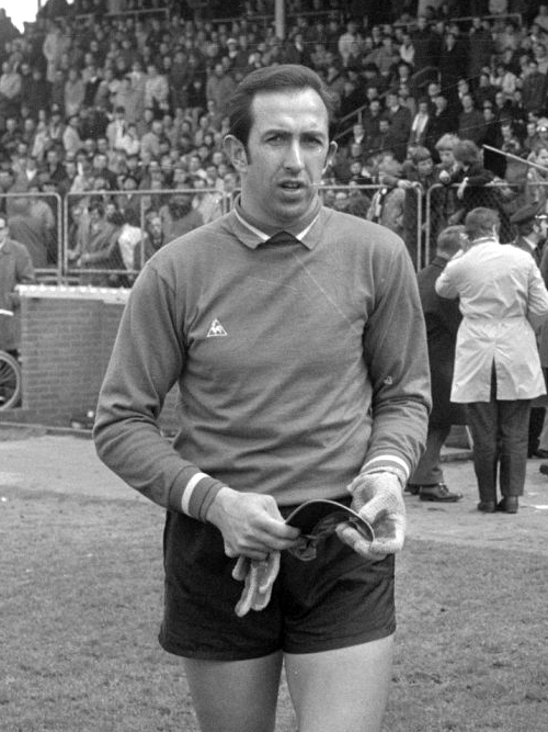 Feyenoord keeper Eddy Pieters Graafland.